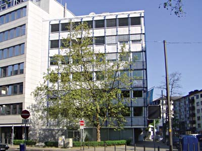 Stolpersteinlage Gärtnerweg 2 Freigabe [Ticket#2013102810006014] erteilt von Initiative Stolpersteine Frankfurt am Main e.V.